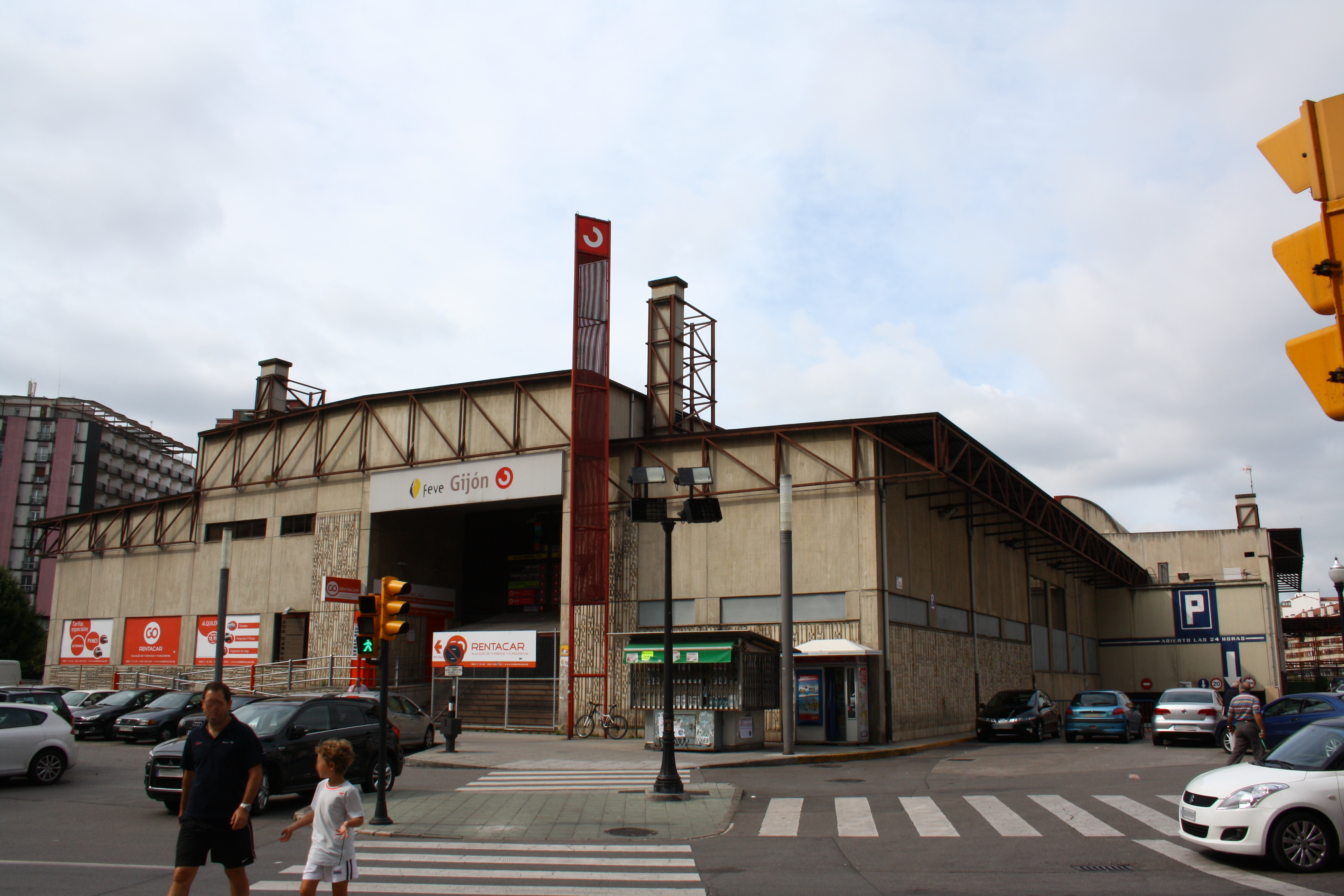 Antigua estación de Renfe y Feve en la plaza del Humedal.